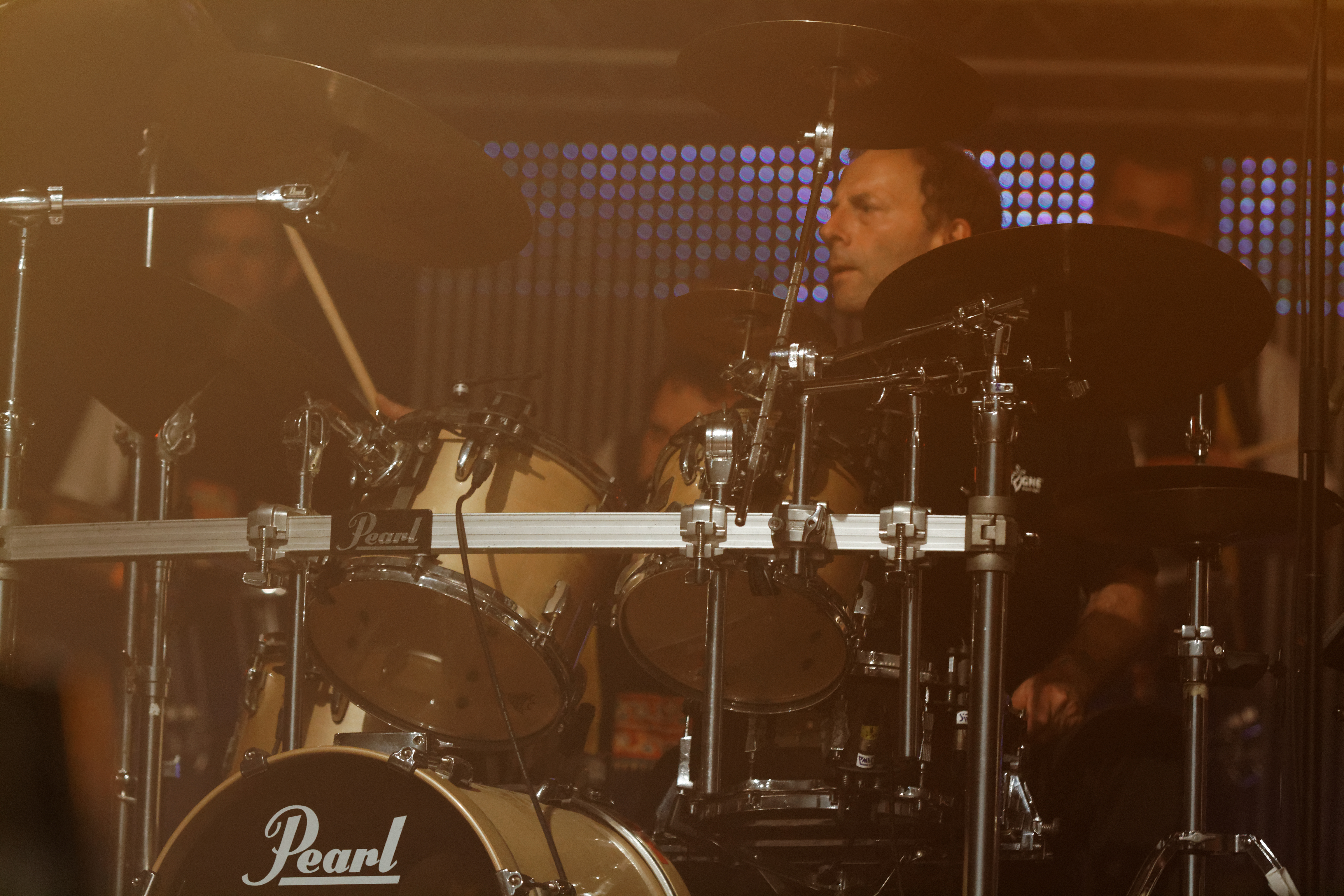 Patrick Boileau avec Dan Ar Braz et le bagad Kemper en concert à l'espace Gradlon lors du festival de Cornouaille 2013, à l’occasion des 90 ans du Cornouaille et des 20 ans de la création de l’Héritage des Celtes.